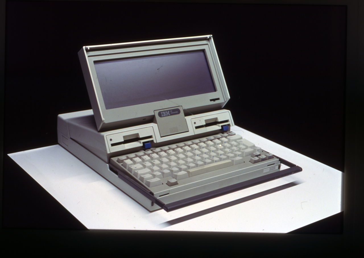 Il case in metallo si presenta come un parallelepipedo avente sul fronte una maniglia retrattile e uno sportello che, aperto, si rivela essere il monitor LCD da 10" (monocromo con risoluzione testo 80x25 e grafica 640x200 oppure 320x200). A case aperto, simmetricamente ai lati del monitor, sono visibili due drive per floppy disk da 3,5" (720 kb ciascuno), e in basso la tastiera a 79 tasti ROM 64 kb. Processore: Intel 80C88a 8 bitFrequenza: 4.77 MHzRAM: 256-640 512 kb. Notizie storico-critiche Computer portatile IBM 5140 è noto sul mercato italiano con il nome di "Ventiquattrore". Con il cabinet disegnato nell'1985 dal designer tedesco Richard Sapper e prodotto dall'americana IBM a partire dal 1986, è stato uno dei primi portatili apparsi sul mercato. Il monitor LCD e la tastiera sono estraibili e intercambiabili; la parte posteriore del 5140 può alloggiare una stampante che prosegue, nella forma, la linea del computer. Da questa versatilità deriva l'altro suo nome di "Convertible". A macchine di questo tipo si deve il grande merito di aver reso l'informatica una tecnologia alla portata di tutti.